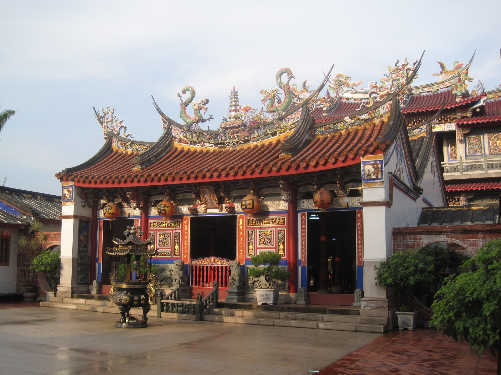 藍田書院，南投縣古蹟。